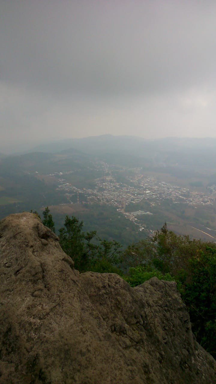 paisaje del pueblo de Moyuta